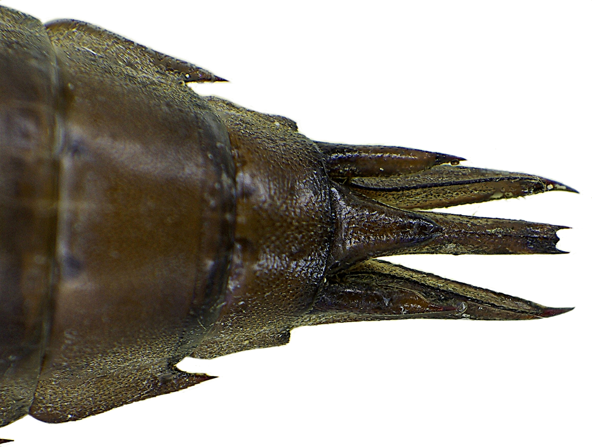 Abdominalende von Exuvie von Aeshna juncea von oben